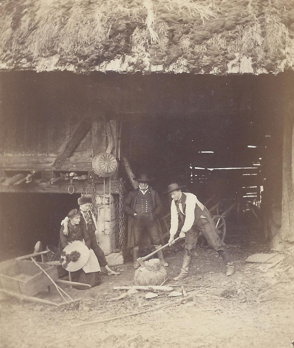 Numa Blasnc: Holzspaltende Schwarzwälder in Antogast (Perterstal) im Renchtal 1863